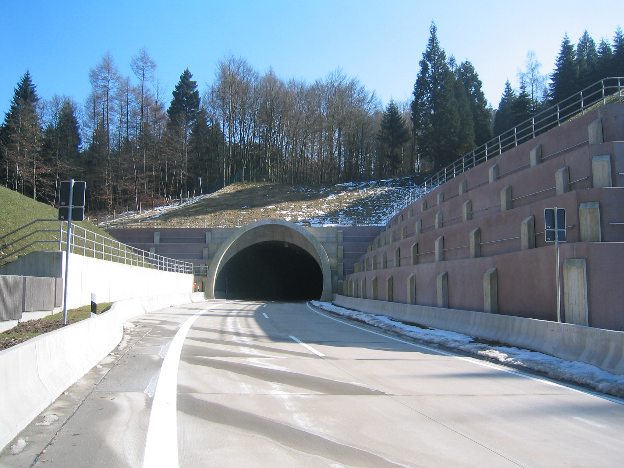 Burgholztunnel in Wuppertal. Nordröhre, Ausfahrt. Westportal. Blickrichtung Bergauf. Sonnborn - Cronenberg. (Foto: 1 1/2 Wochen vor Eröffnung).